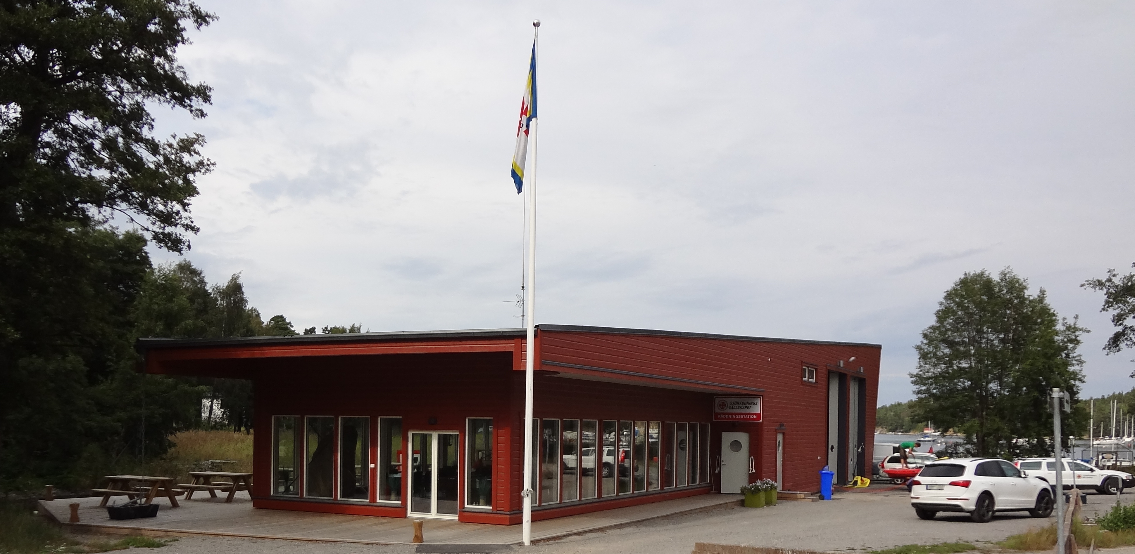 Sjöräddningssällskapets räddningsstation på Dalarö.